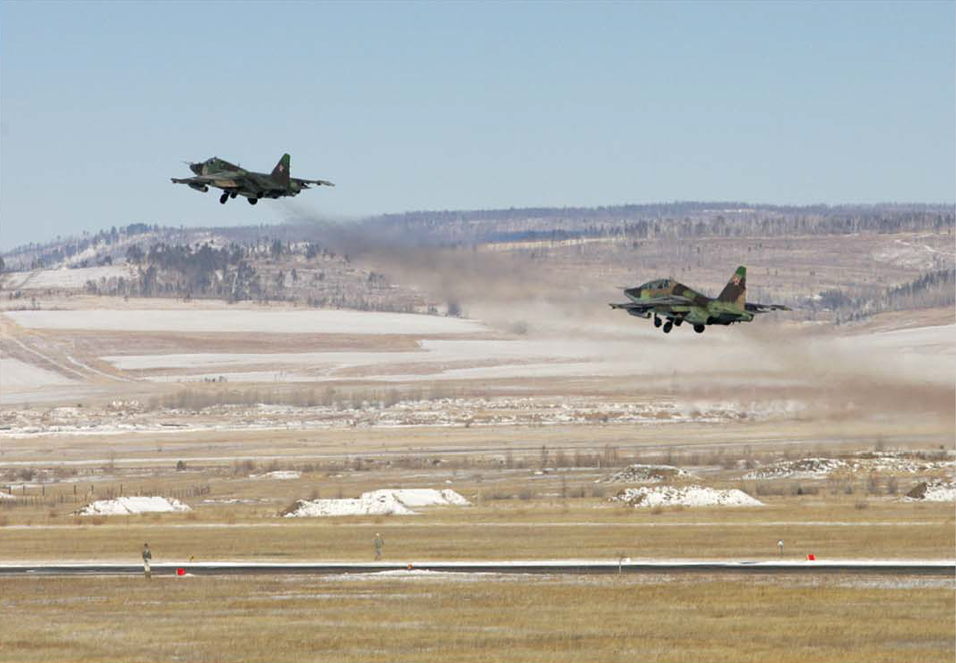 Плановые полеты летчиков авиабазы Домна Восточного военного округа (Забайкальский край) Министерство обороны Российской Федерации